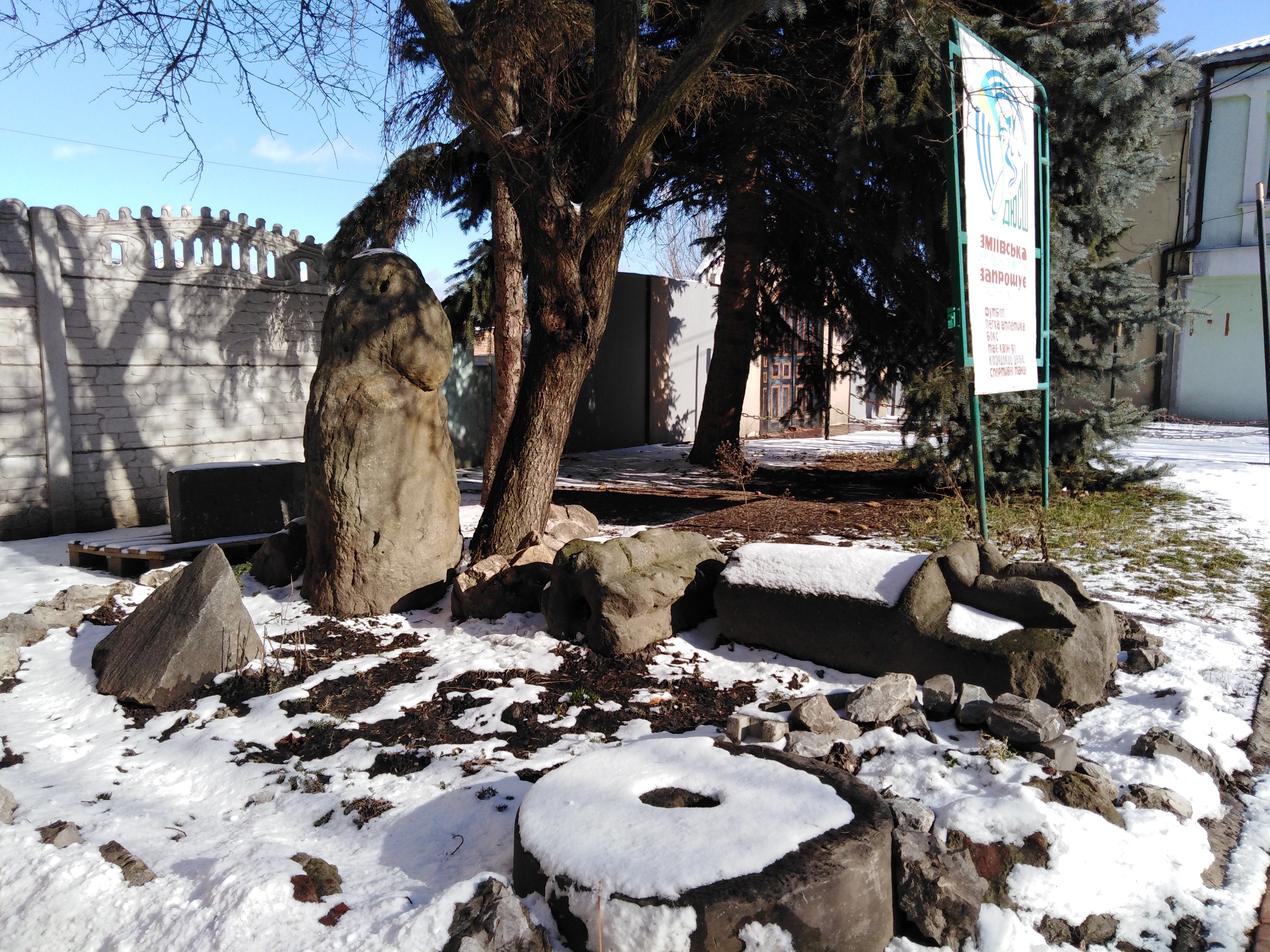 Україна. Харківська область. Зміїв. Краєзнавчий музей. Половецька баба біля входу до музею.